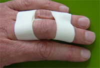 möglicher Tapeverband bei PIG-Seitenbandverl.